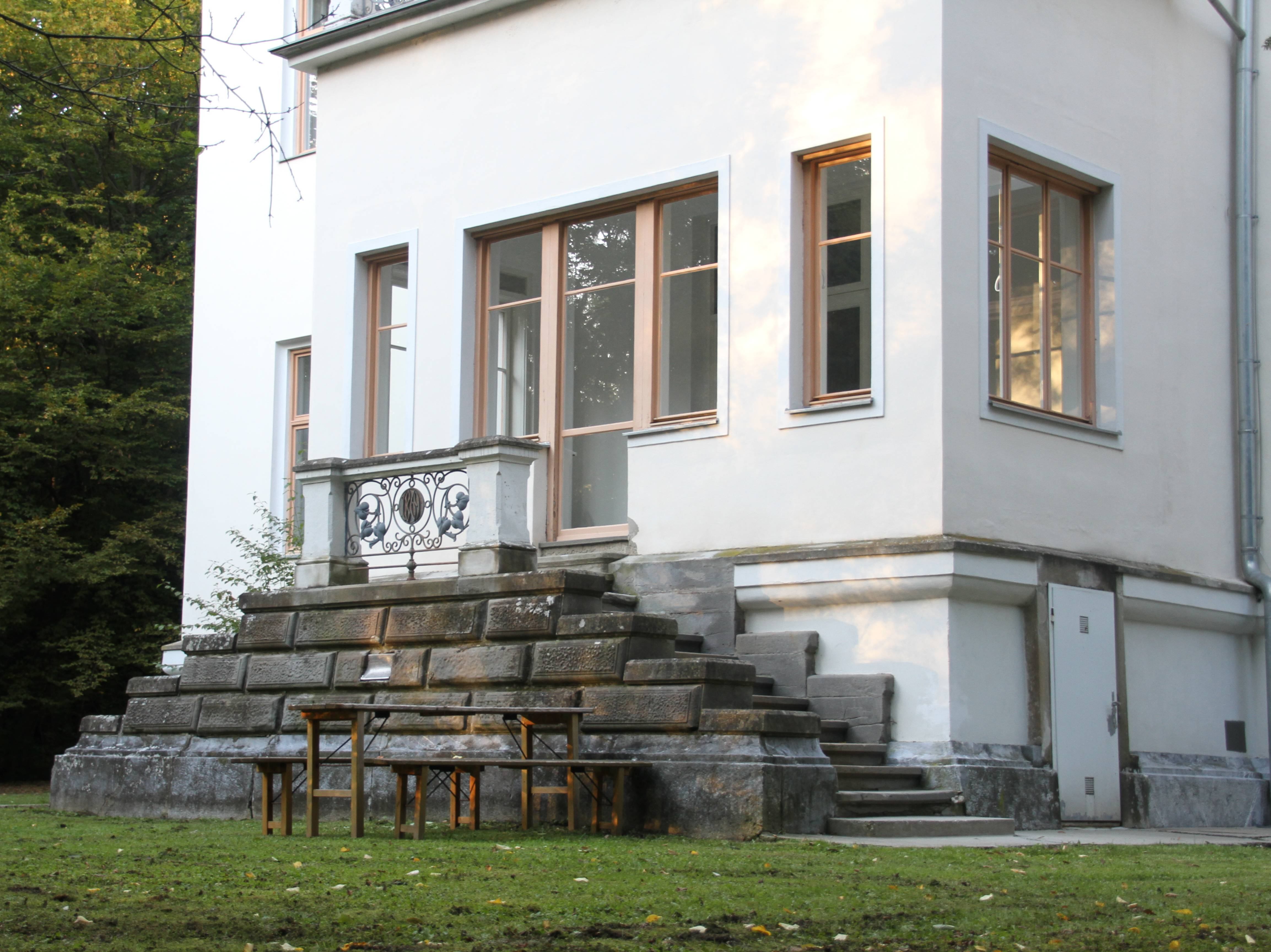 Leechwald-Villa (Detail), Hilmteichstraße 104, Graz, Österreich